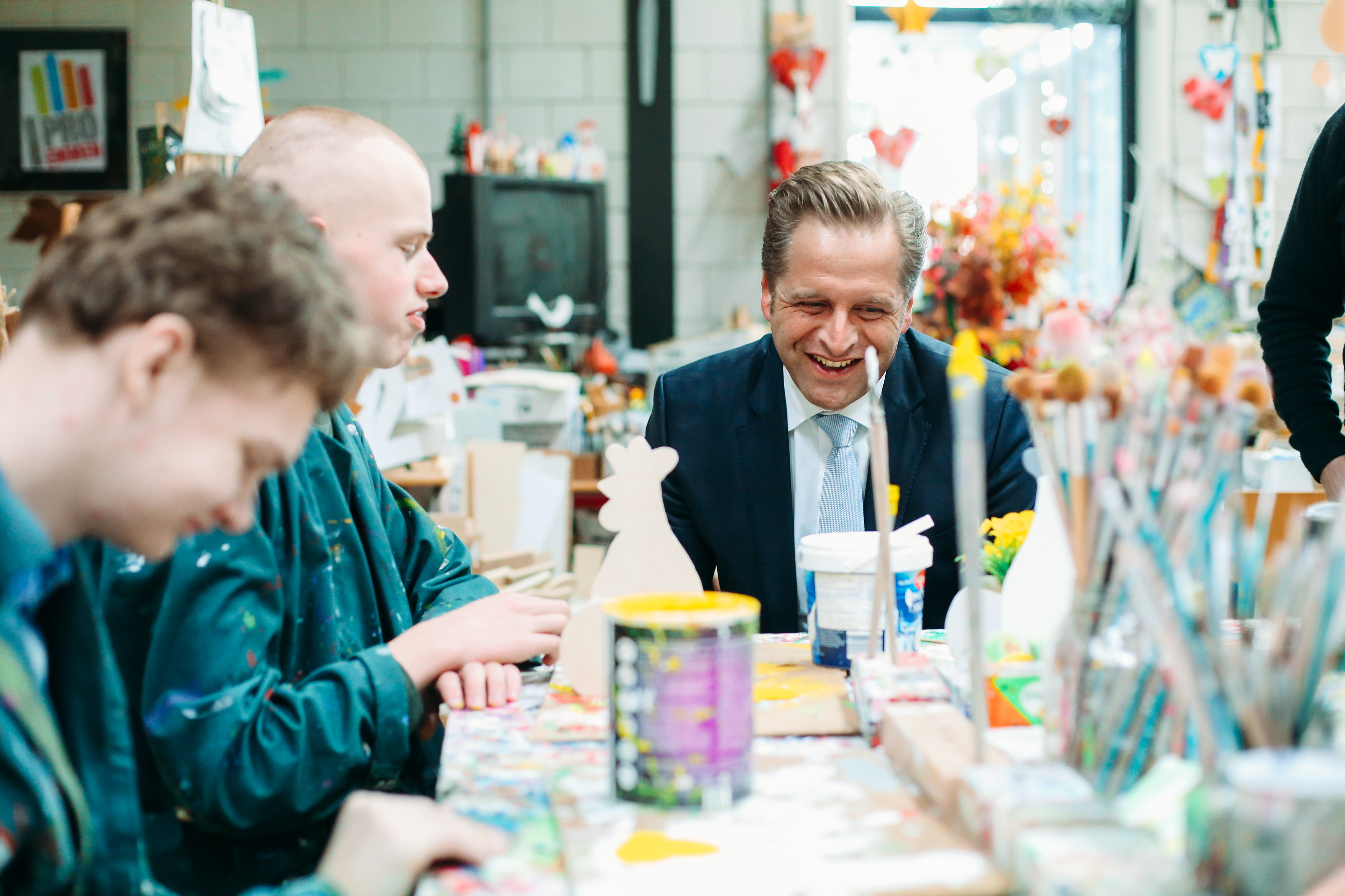 Vicepremier Hugo de Jonge bracht op uitnodiging van drie gemeentelijke CDA-afdelingen een werkbezoek aan PRO Emmen. Na een rondleiding was er een bijeenkomst het het thema 'Ieder kind veilig, gelukkig en gezond'.